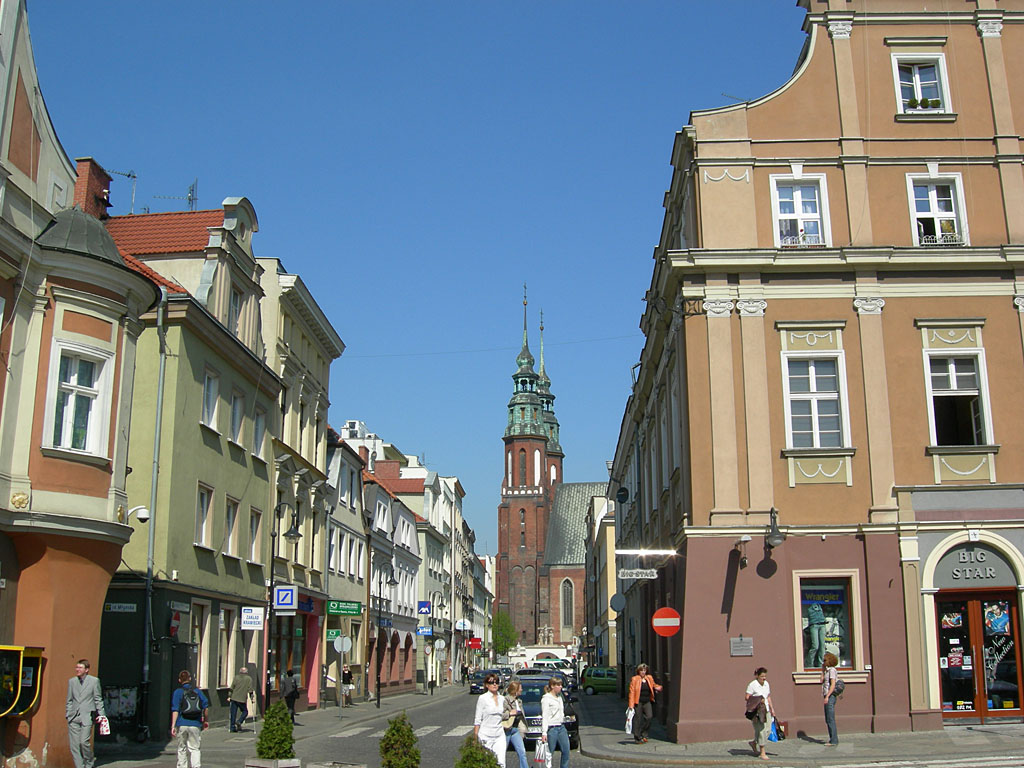 Vue de la vieille ville.